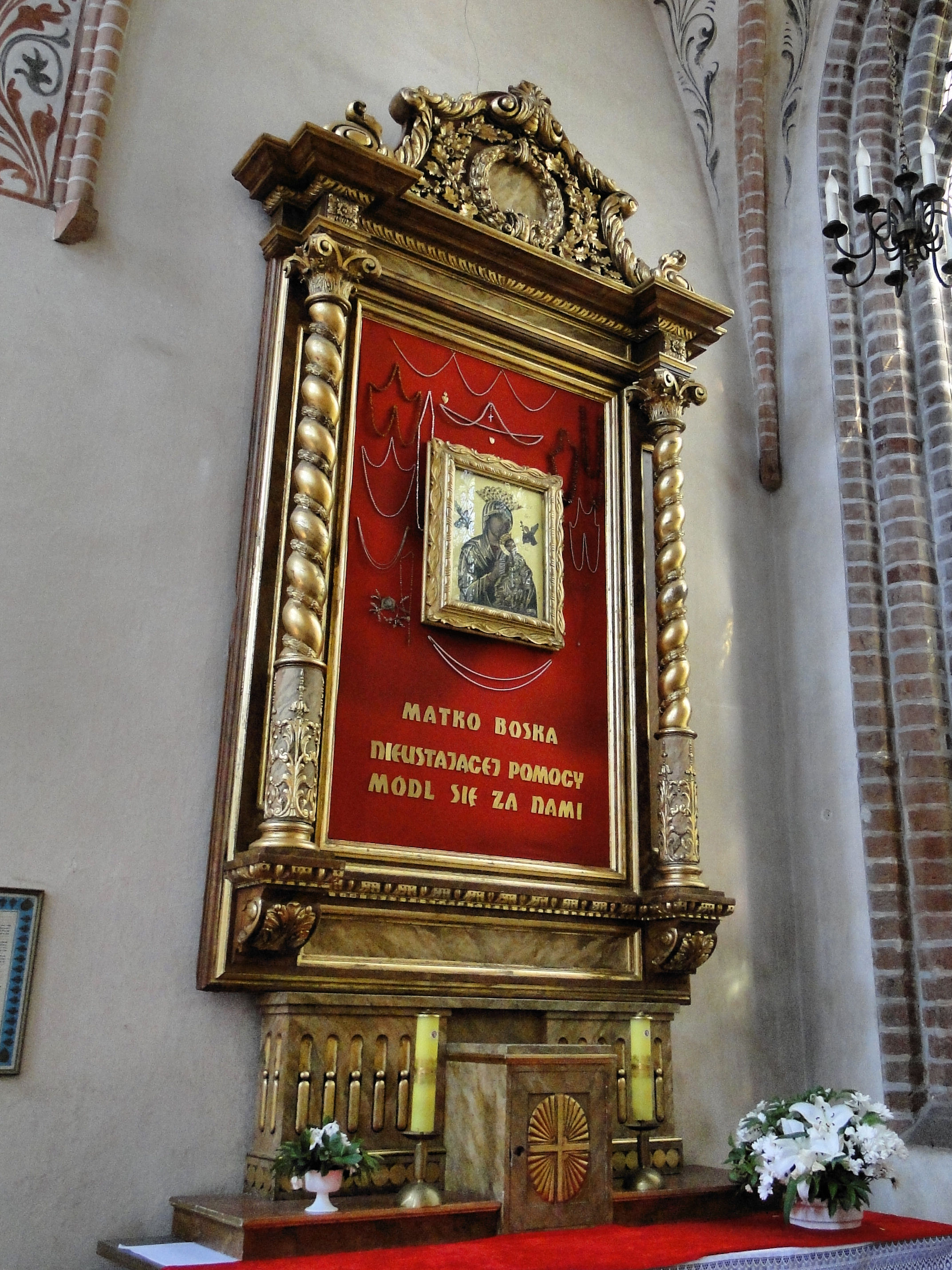 Kościół Mariacki w Stargardzie Szczecińskim